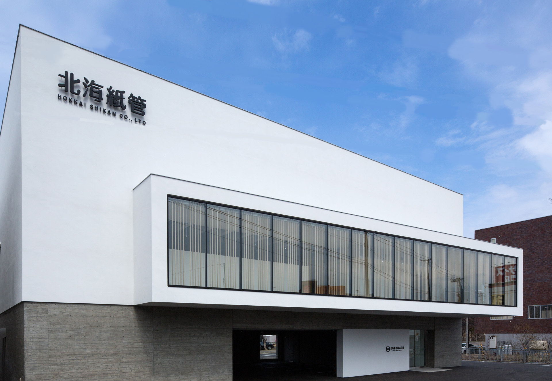 北海紙管㈱ 本社